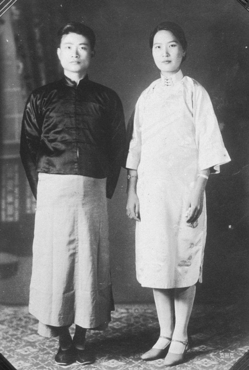 韓石泉與莊綉鸞夫婦